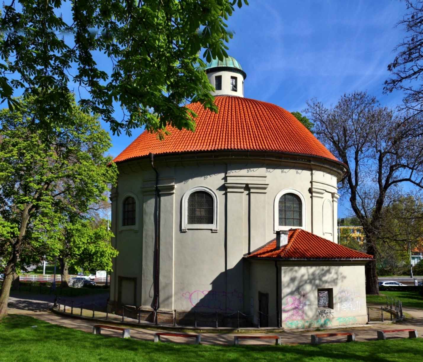 Kostel svatého Rocha, Šebestiána a Rozálie, v Praze 3-Žižkově